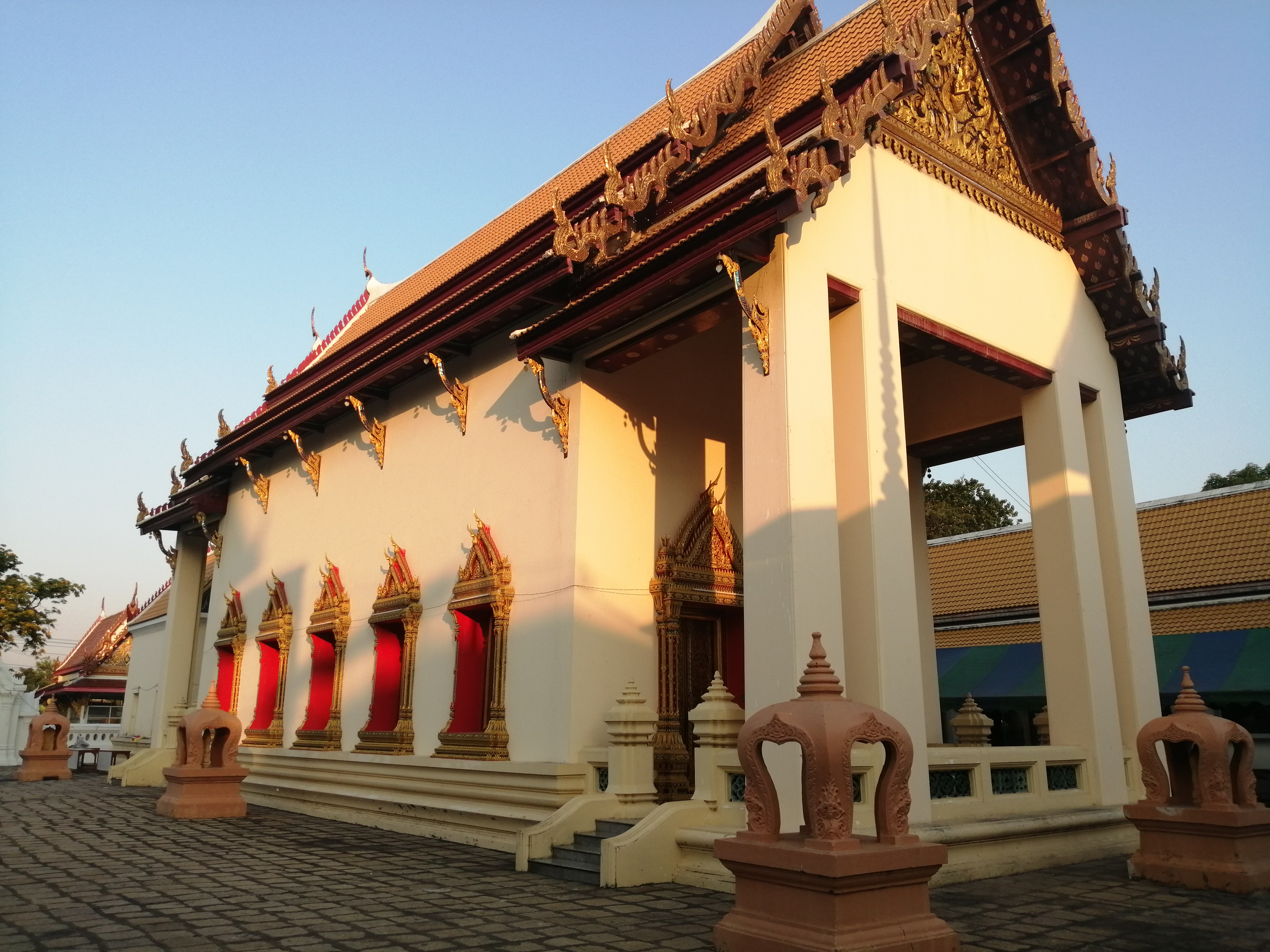 พระอุโบสถ